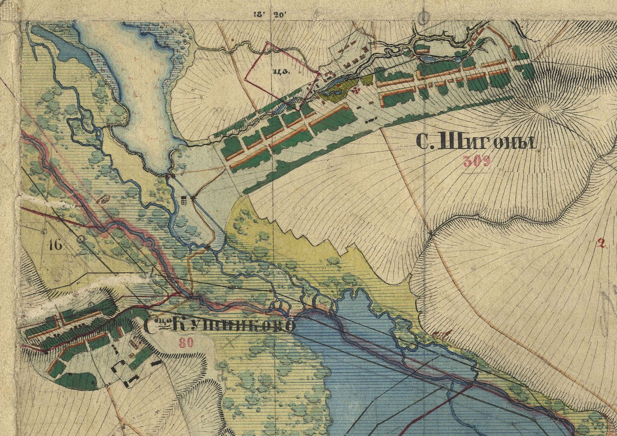 Фрагмент карты Симбирской губернии 1859 года.